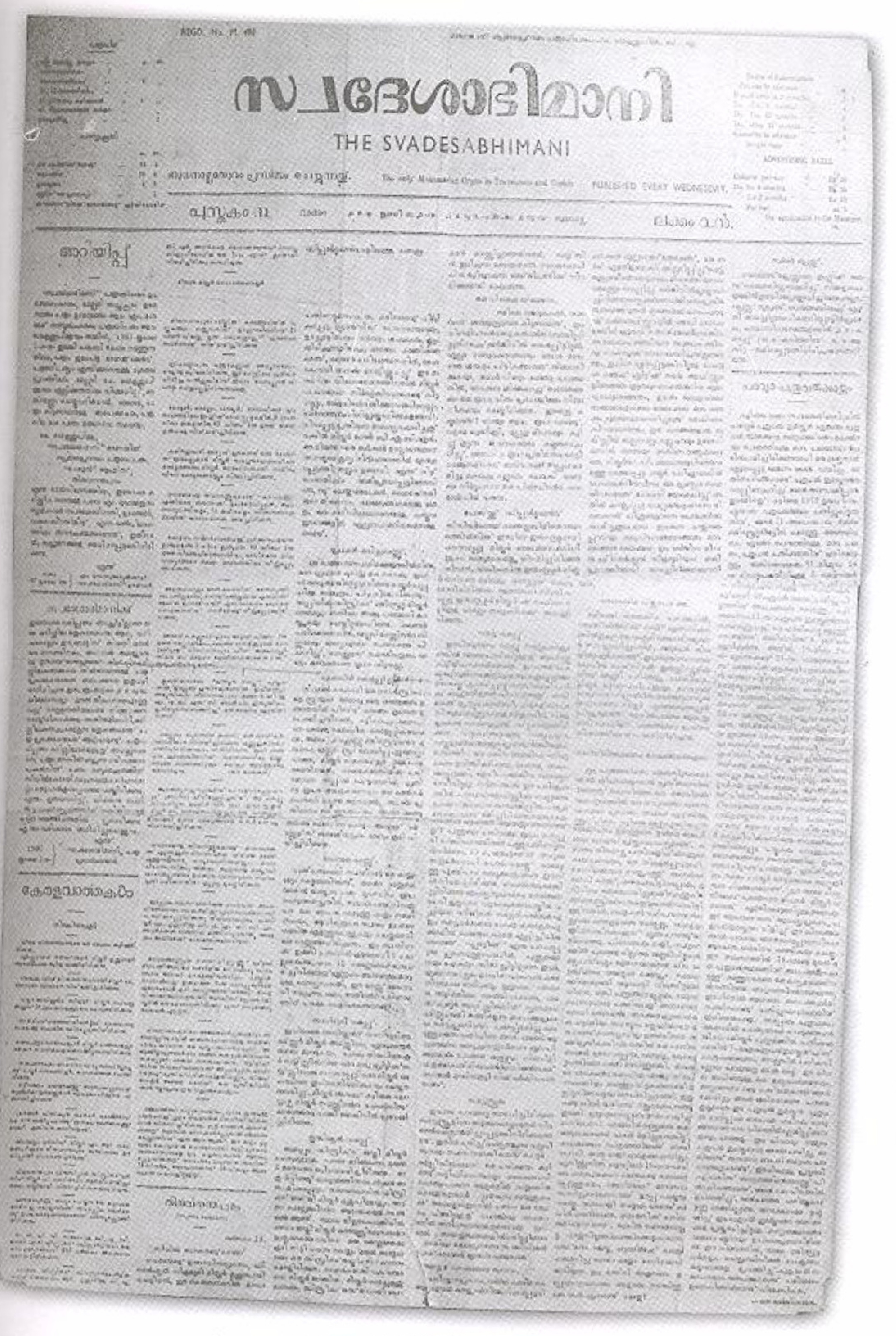 'സ്വദേശാഭിമാനി' പത്രത്തിന്റെ ആദ്യപുറം